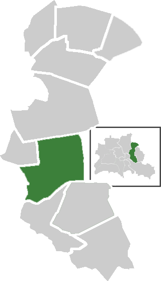 Lage des Ortsteil Lichtenberg im Berliner Bezirk Lichtenberg